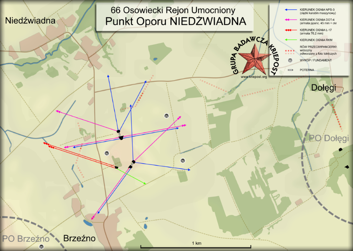 Linia Mołotowa - Punkt Oporu Niedźwiadna, 66 Osowiecki Rejon Umocniony